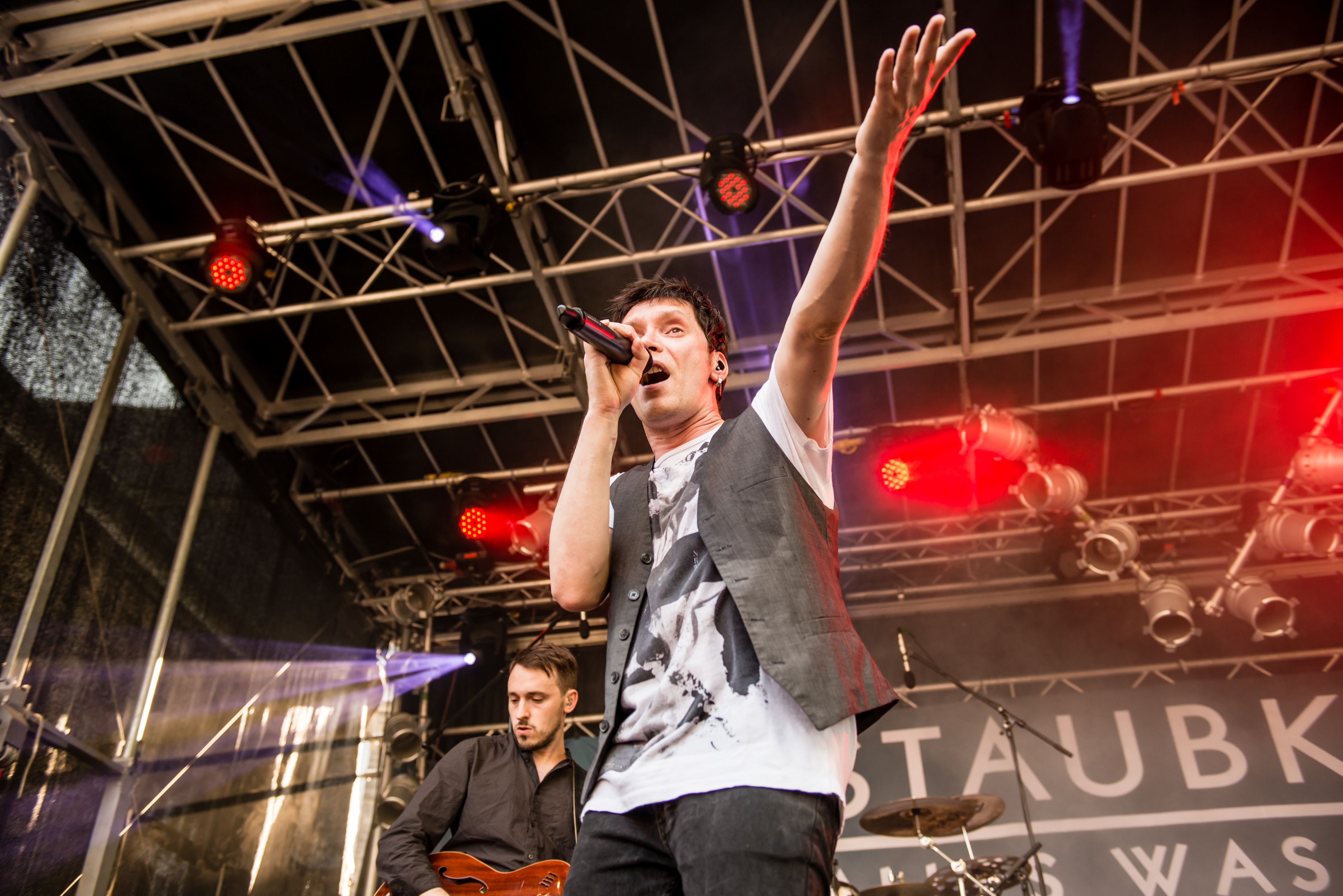 'Castle Rock 2015; Mülheim Schloß Broich': 'Staubkind'